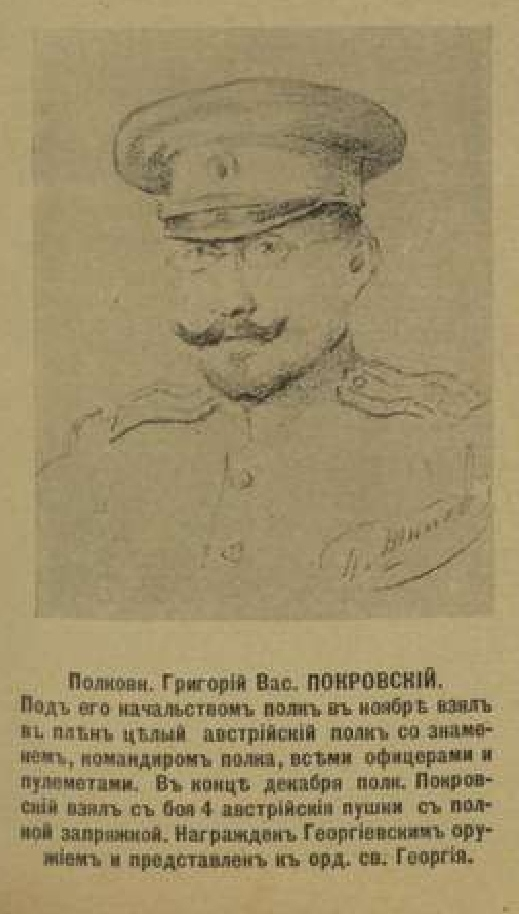 Покровский А.А. из газеты